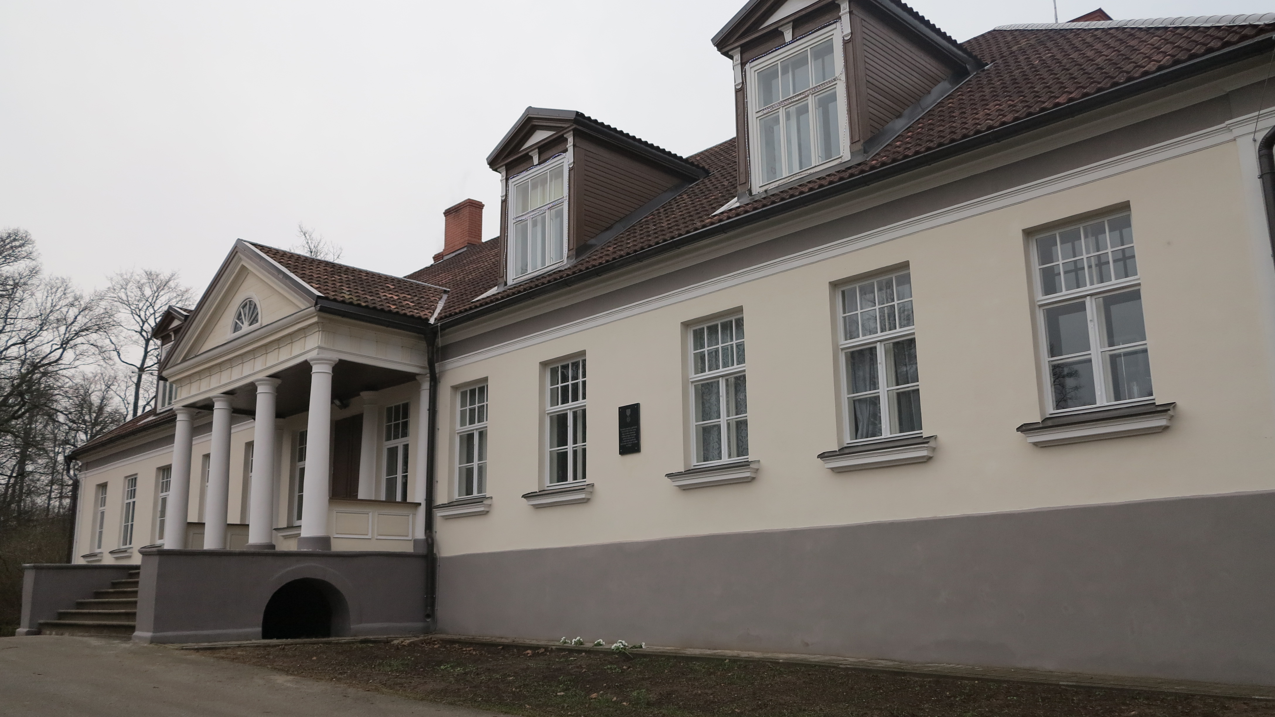 Drabeši mõisa peahoone 2013. aastal.